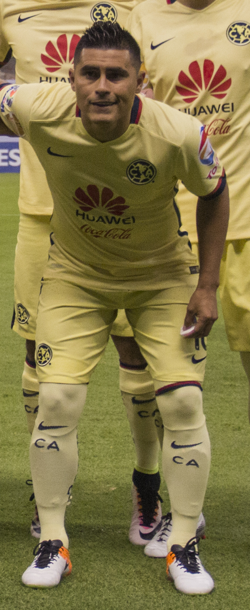 América vs Santos